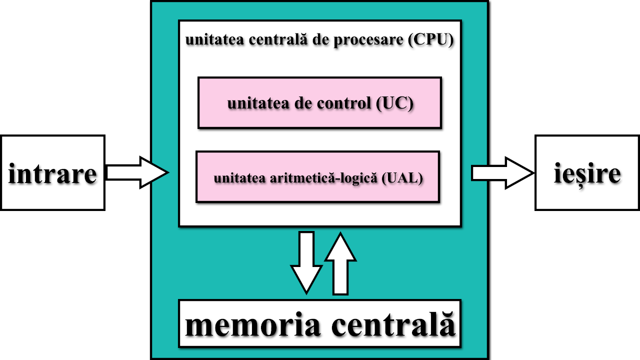 Schema arhitecturii von Neumann cu elemente